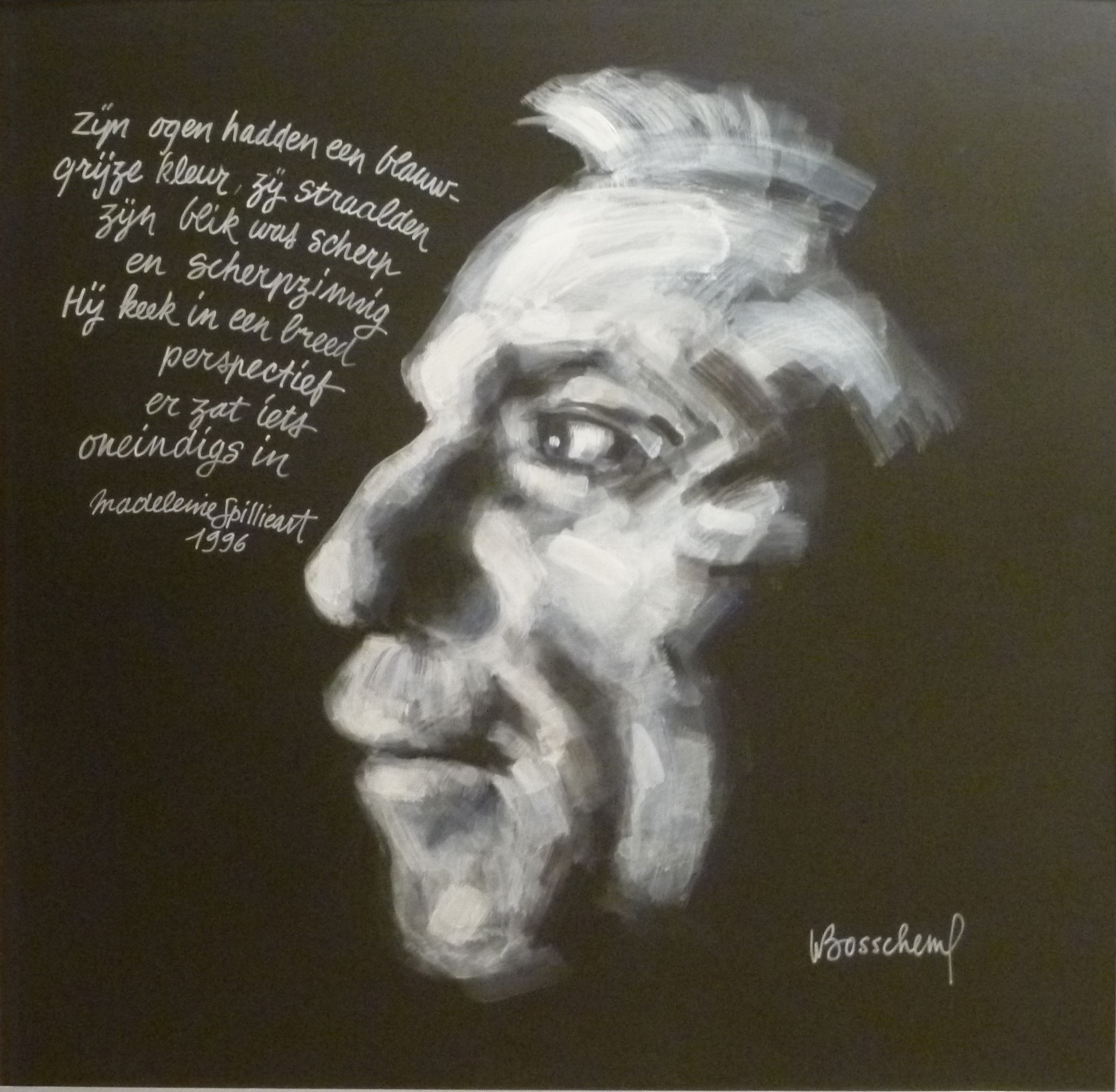 "Léon Spilliaert - Maandromer" (2013) acryl op paneel (100 x 100 cm) door de Belgische kunstschilder Willy Bosschem